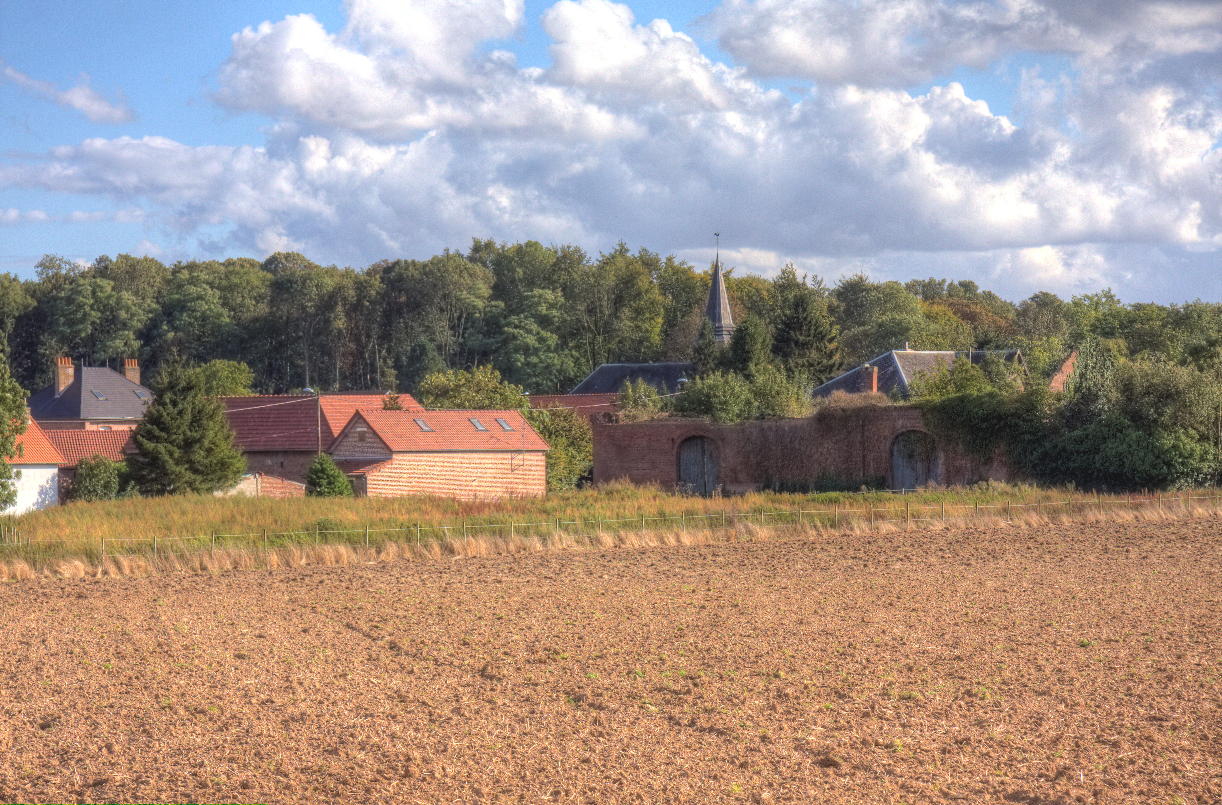 Vue générale sur le village de Morchies